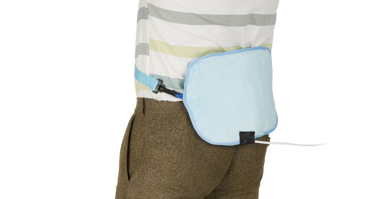 کیسه نمک گرم مهربان آسایش